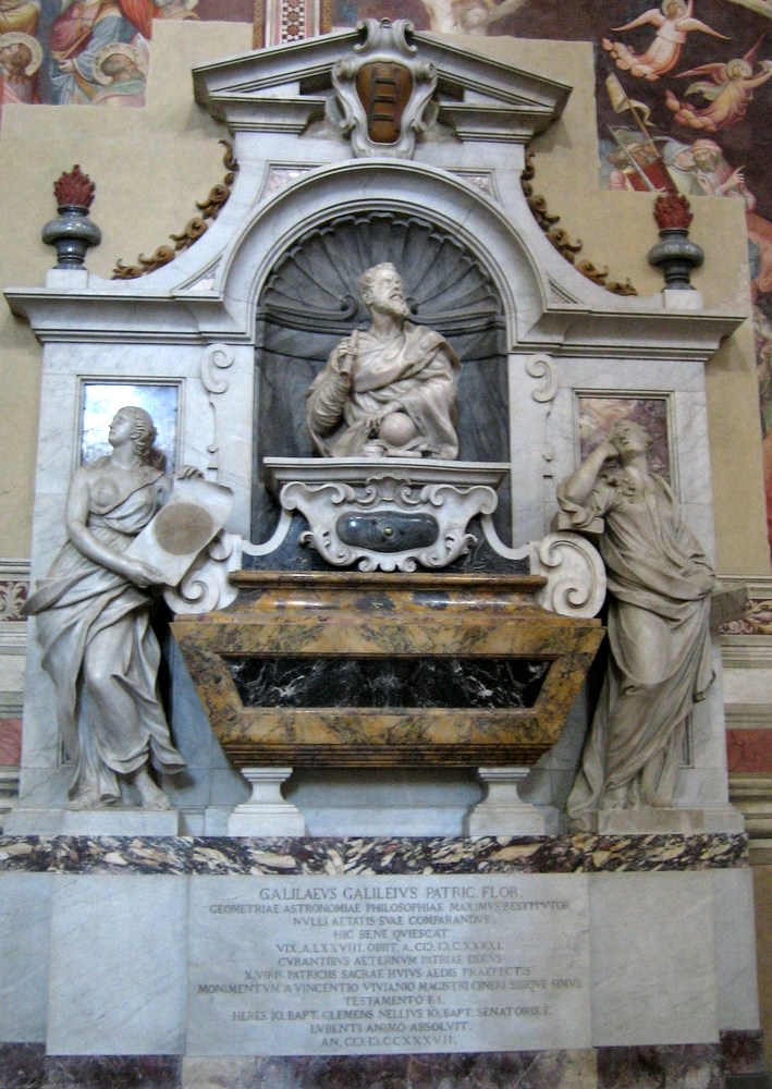 Tomba di Galileo Galilei. Santa Croce, Firenze, Toscana, Italia.